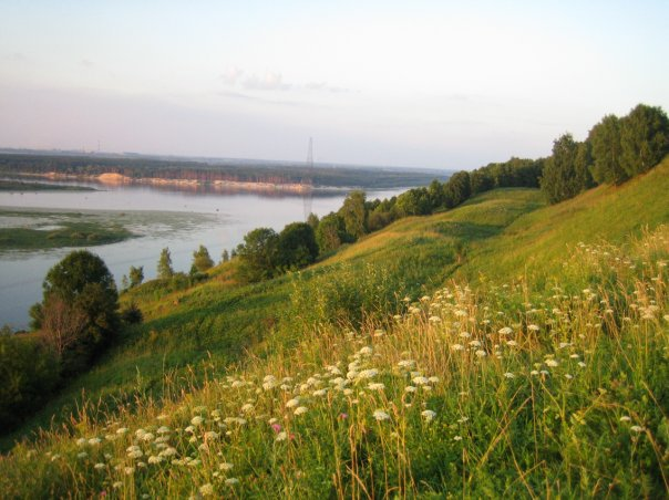 Вид из Дуденева на противополжнывй берег реки Оки и на Шуховскую башню